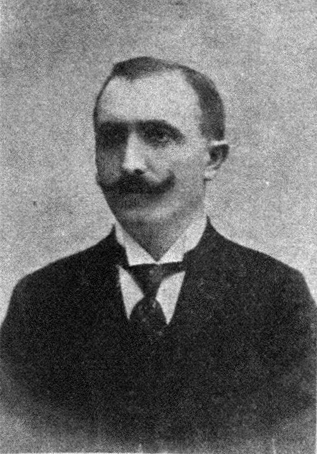 Österreichischer Politiker, Reichsratswahl 1907, Name siehe Dateiname